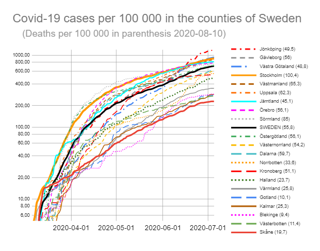 Antal Covid-19-fall och döda per 100 000 invånare över tid i Sveriges län